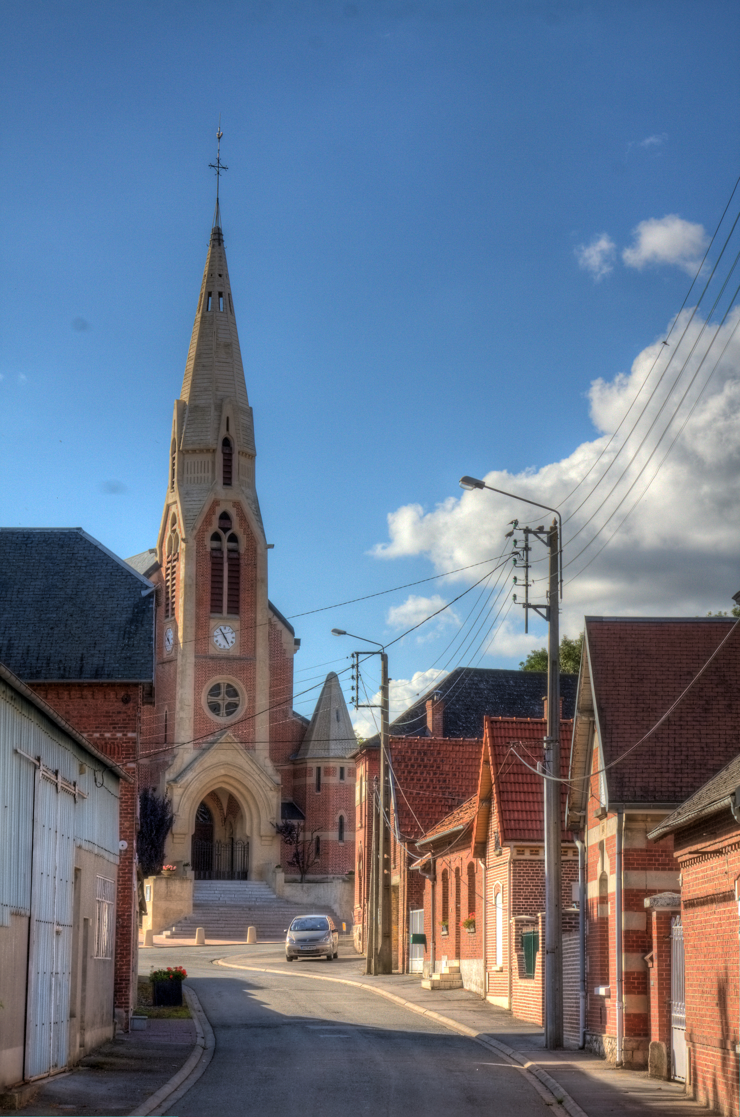 L'église de Beaumetz lès Cambrai